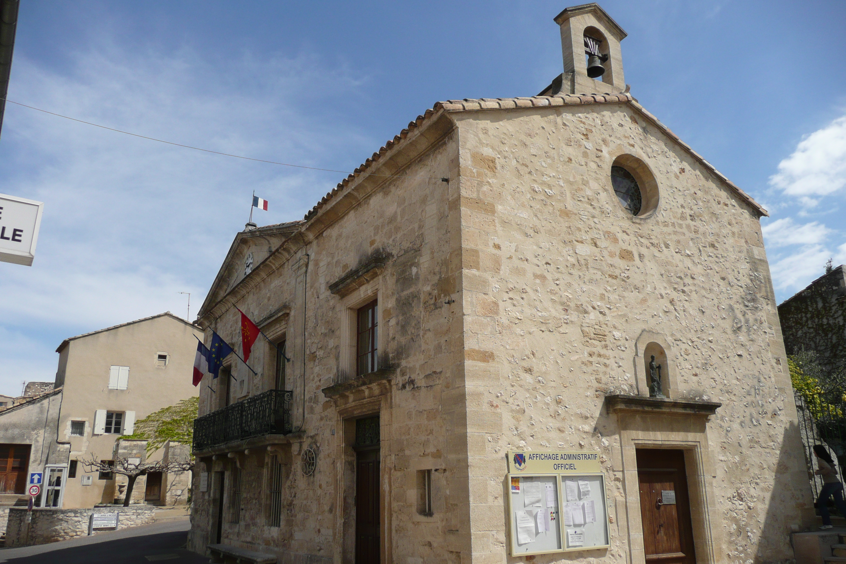 Ancienne Chapelle Saint Joseph construite en 1735, hôtel de ville depuis 1825 à Rochefort-du-Gard.